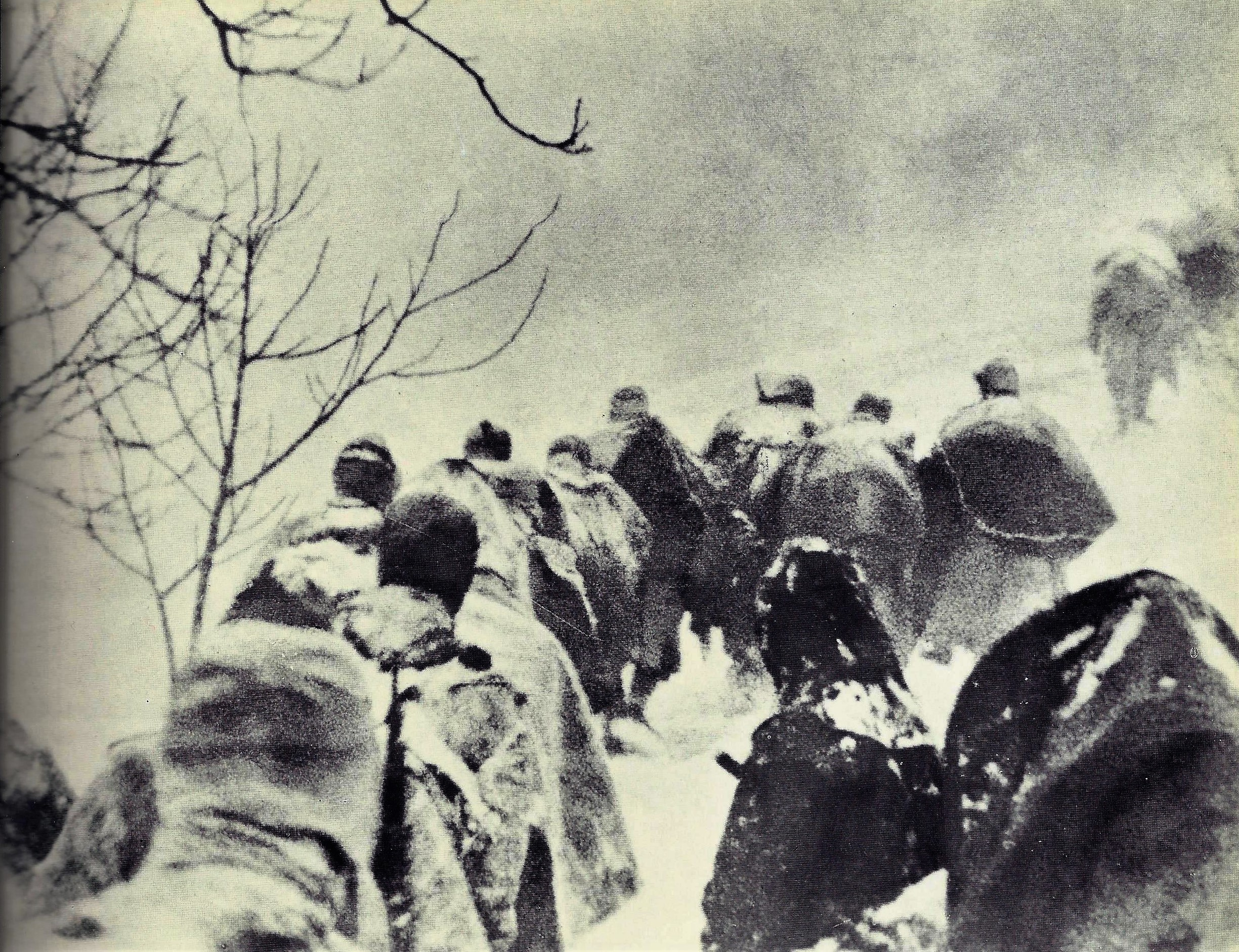 Pohod 14. divizije nad Loko pri Zidanem Mostu